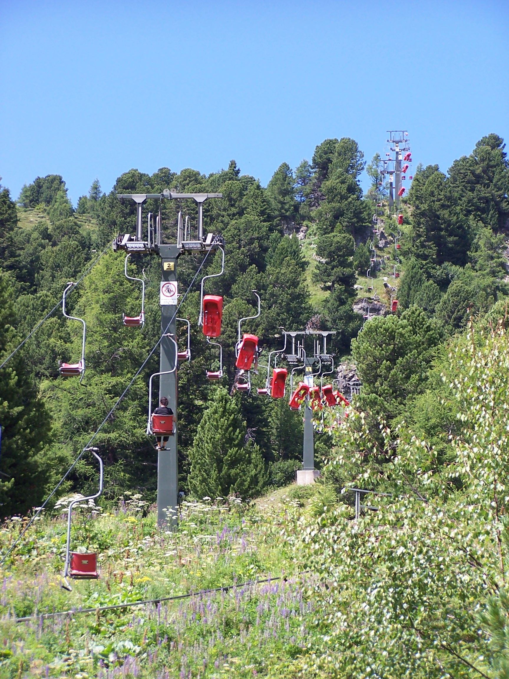 Turracher Höhe: Sessellift zur Sommerrodelbahn